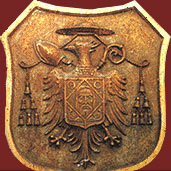 Herb Zgromadzenia Kanoników Regularnych Laterańskich